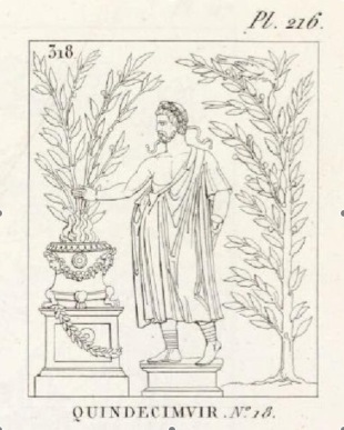 XVuir sacris faciundis en train de faire un sacrifice. Détail d'une base en marbre du Louvre, département des antiquités grecques, étrusques et romaines. Dessin tiré de Clarac, Musée de sculpture antique et moderne contenant une suite de planches au trait..., Planches, tome II, Paris, 1828-1830, pl. 216, n° 318.